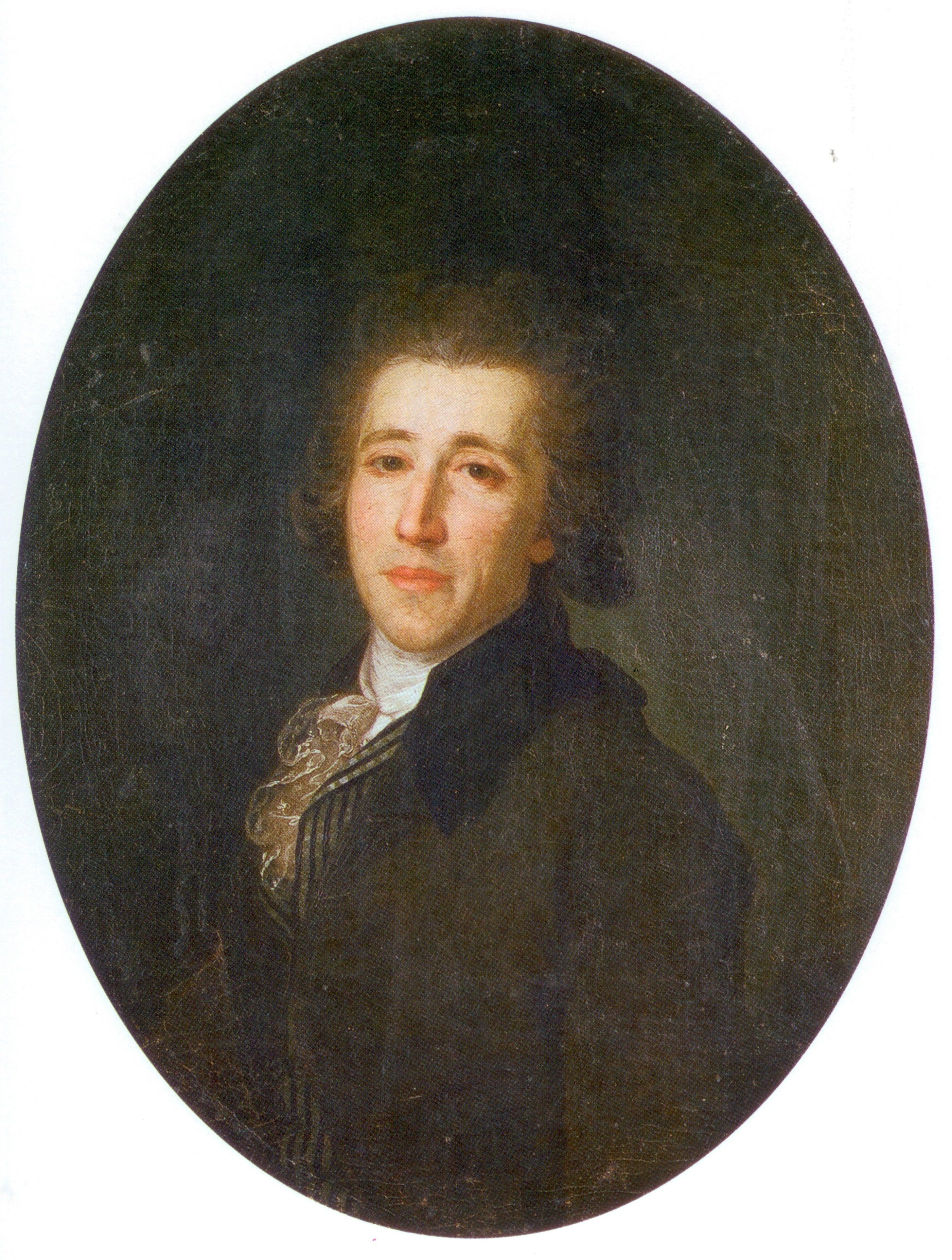 князь Фёдор Николаевич Голицын (1751-1827) - куратор Московского университета